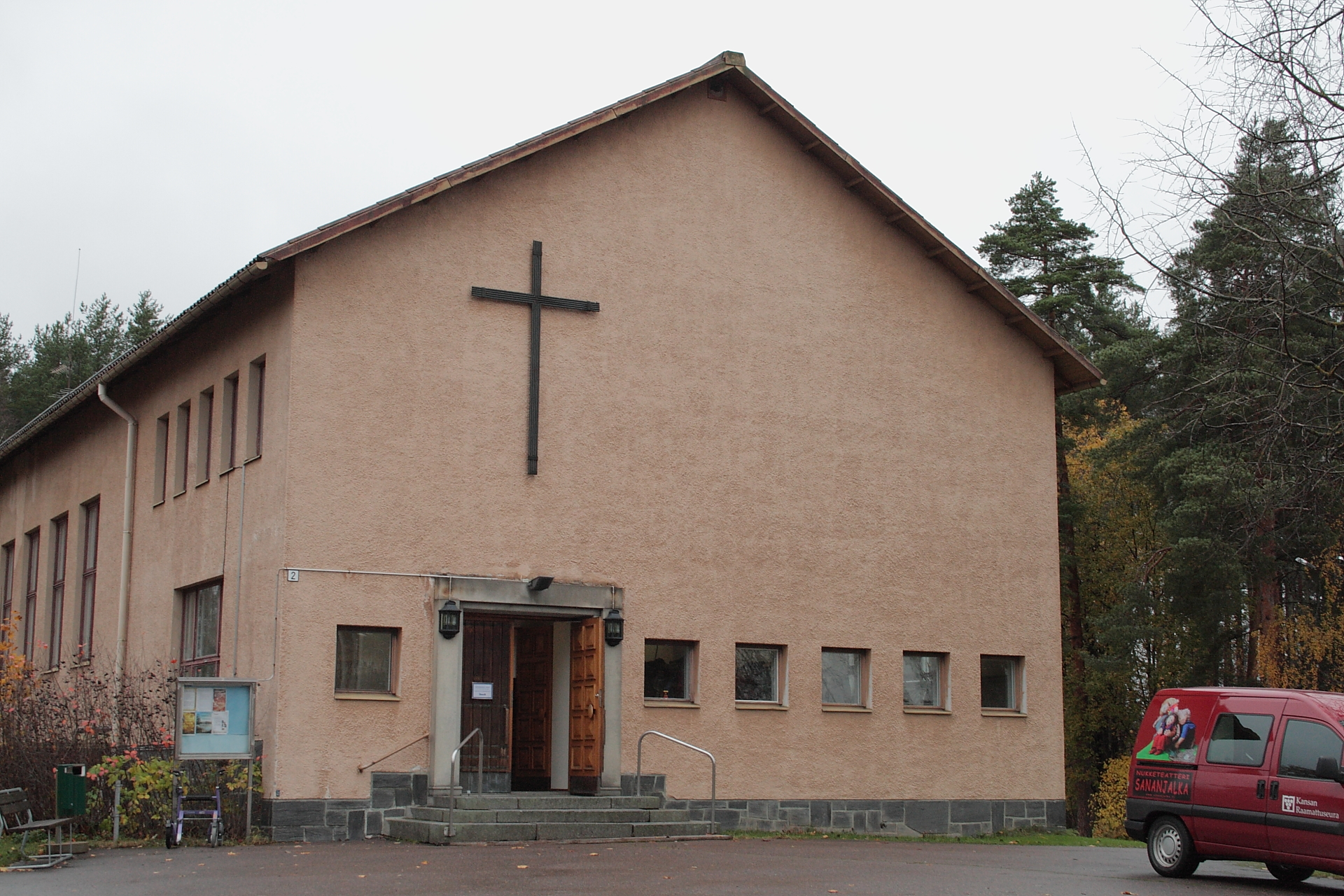 Imatrankoski Church, Imatra, Finland